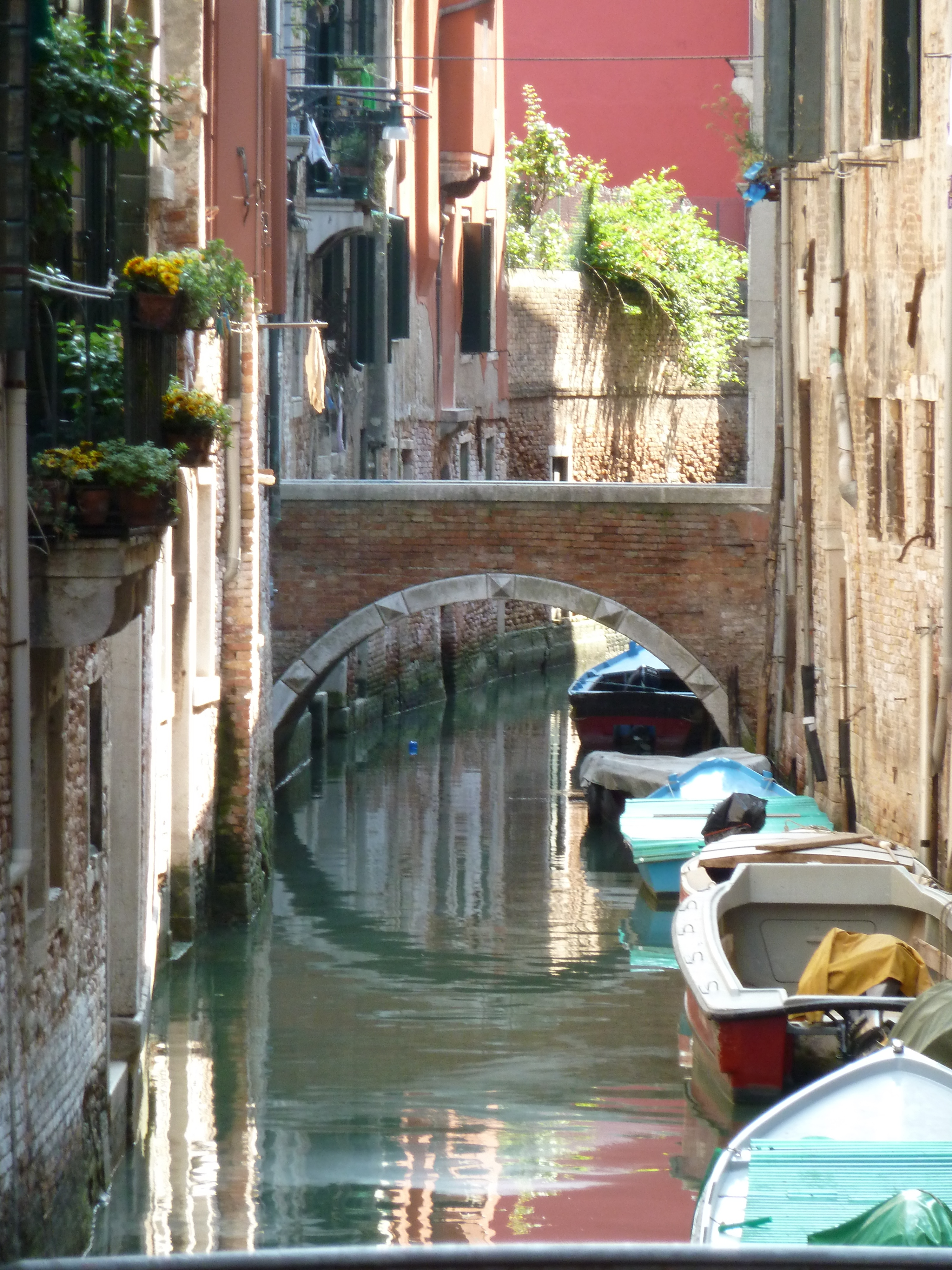 Ponte Raspi o Sansoni